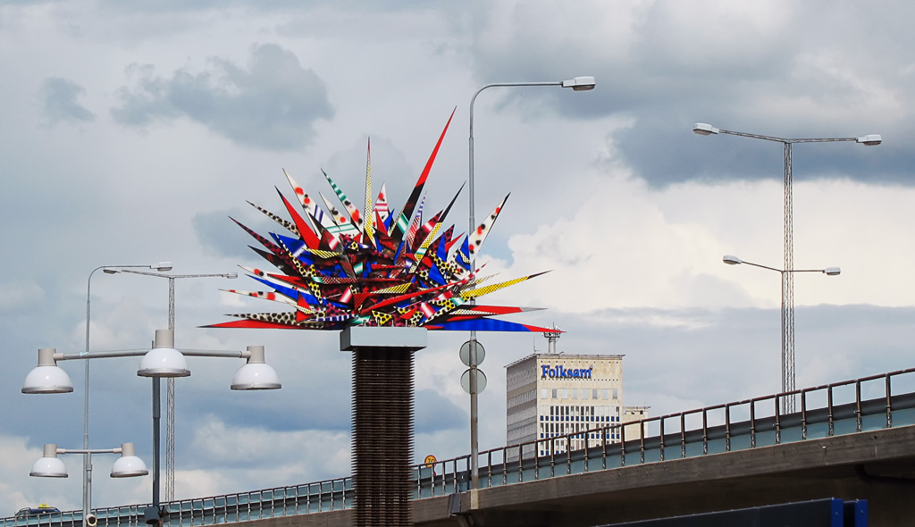 "Zenit", målad stålskulptur; Leif Tjerned 1995